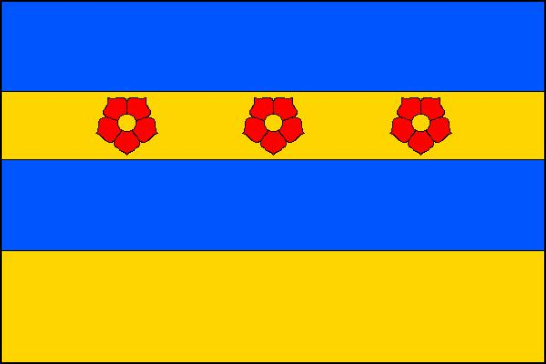 Vlajka obce Domoraz